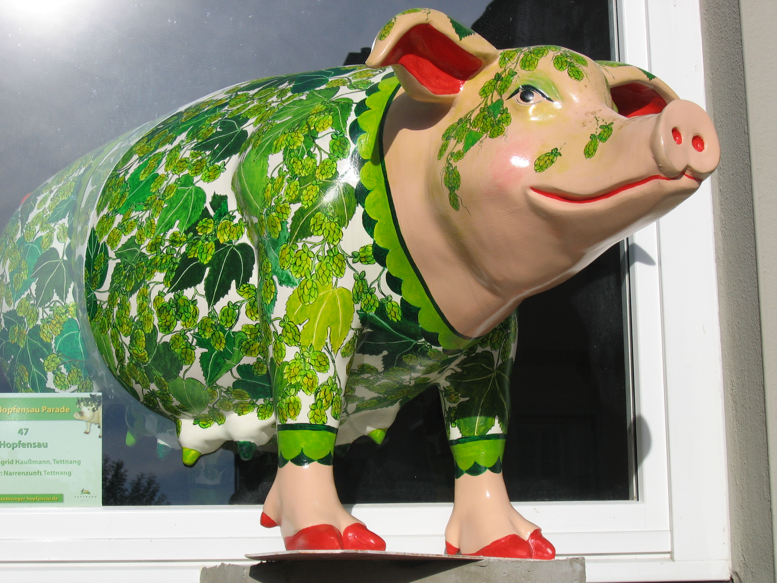 Deutschland - Baden-Württemberg - Bodenseekreis - Tettnang: Hopfensauparade (2006) - "Hopfensau ..., das Original" Künstler/in: Ingrid Haußmann, Tettnang Besitzer/Sponsor: Narrenzunft Tettnang